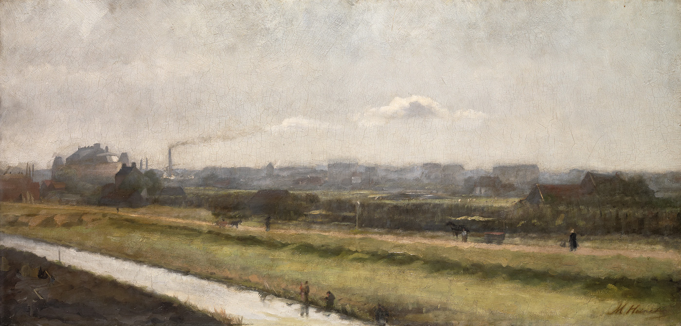 schilderij; Amsterdam Zuid; Vondelpark; Willemsparkweg; landschap; stadsgezicht; stadsgezicht Amsterdam; Willemsparkweg; Concertgebouw; Koninklijke Waskaarsenfabriek